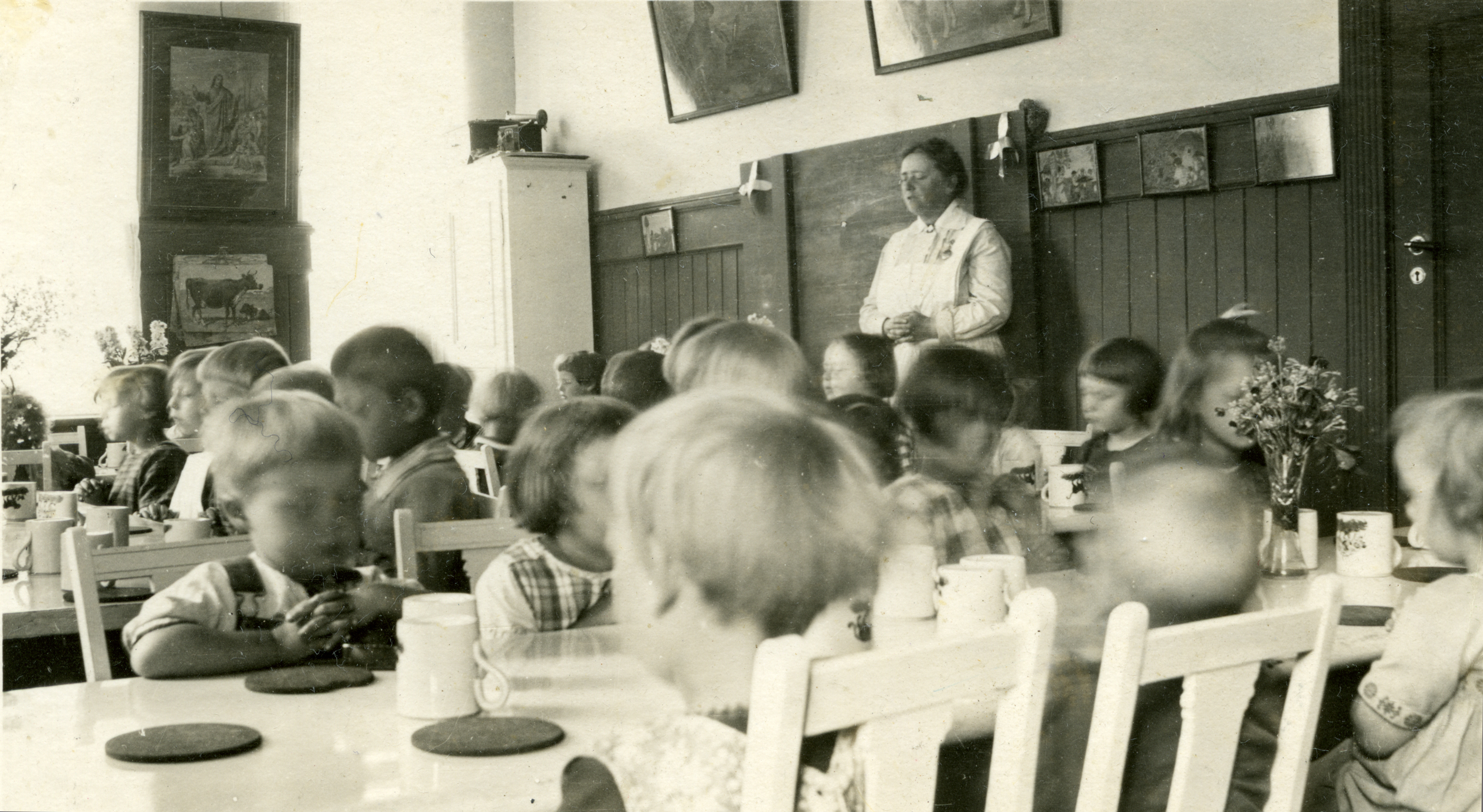 Bildet er hentet fra Arkivverket. Bordbønn ved daghjem i Oslo. Nanna Broch (1879-1971) var boligkontrollør i Oslo helseråd i årene 1919-45. Hun har tatt en rekke fotografier som dokumenterer boligforhold i arbeiderstrøkene i Oslo på 1920-tallet. Hun har dokumentert trangboddhet og bolignød, og hun så blant annet hvor hardt husmødrene slet som følge av dårlige sanitære forhold. Arkivinstitusjon : Riksarkivet Arkivnavn : Broch, Nanna Sted : NORGE, Oslo, Oslo, Emneord: Boligforhold, Sosialhistorie Avbildet